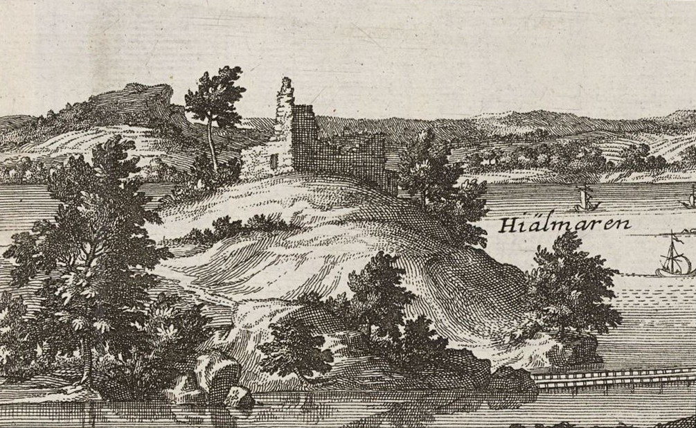 Gamla borgklippan vid Stora Sundby slott, illustration av Erik Dahlbergh i Sueciaverket